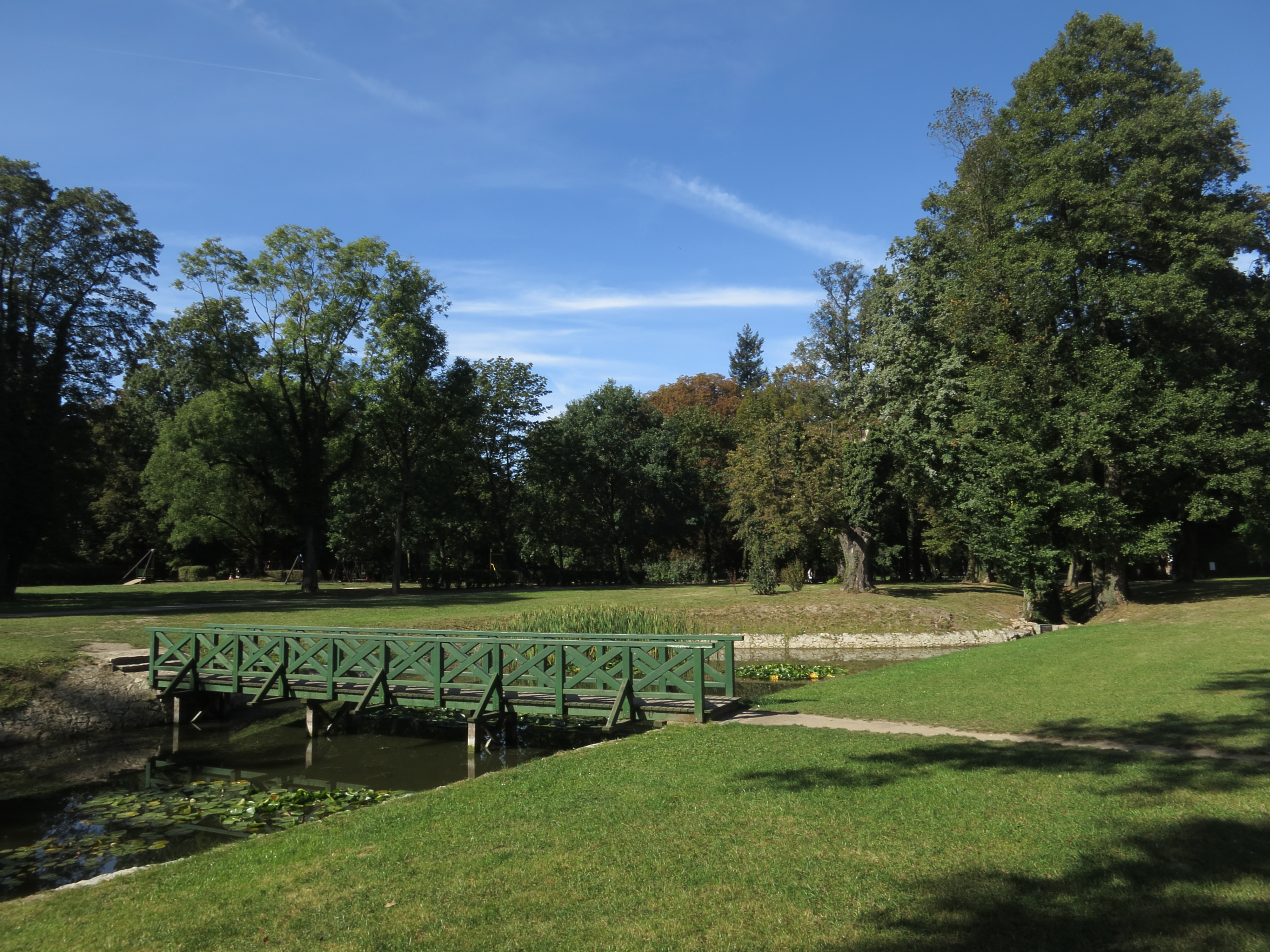 Strzelce Opolskie, park zamkowy, XVIII/XIX Wpisany na listę zabytków pod nr 628633